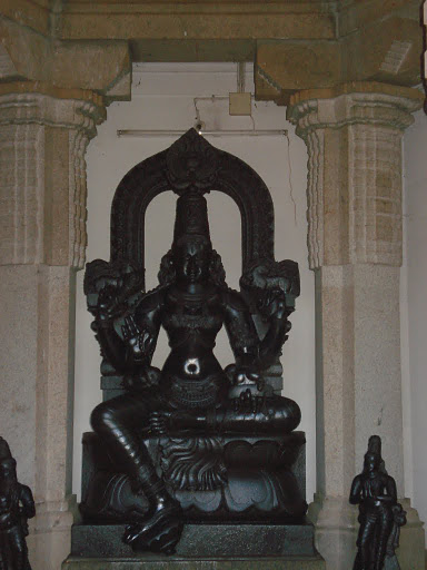 காரைக்குடியில் அமைந்துள்ள தமிழ்த்தாய் கோயிலின் தமிழ்த்தாய் திருவுருவச் சிலை